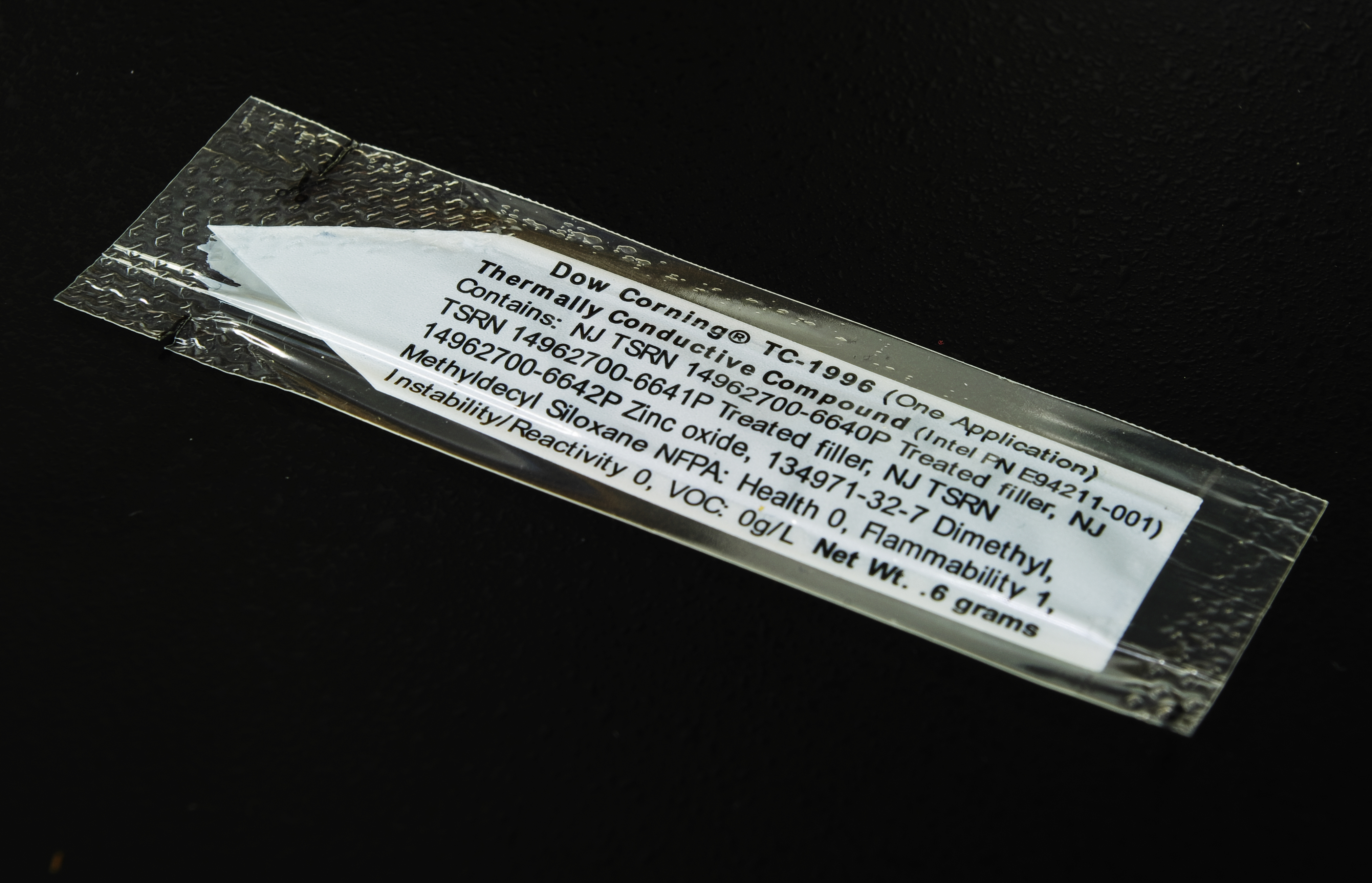 Portionspackung Wärmeleitpaste